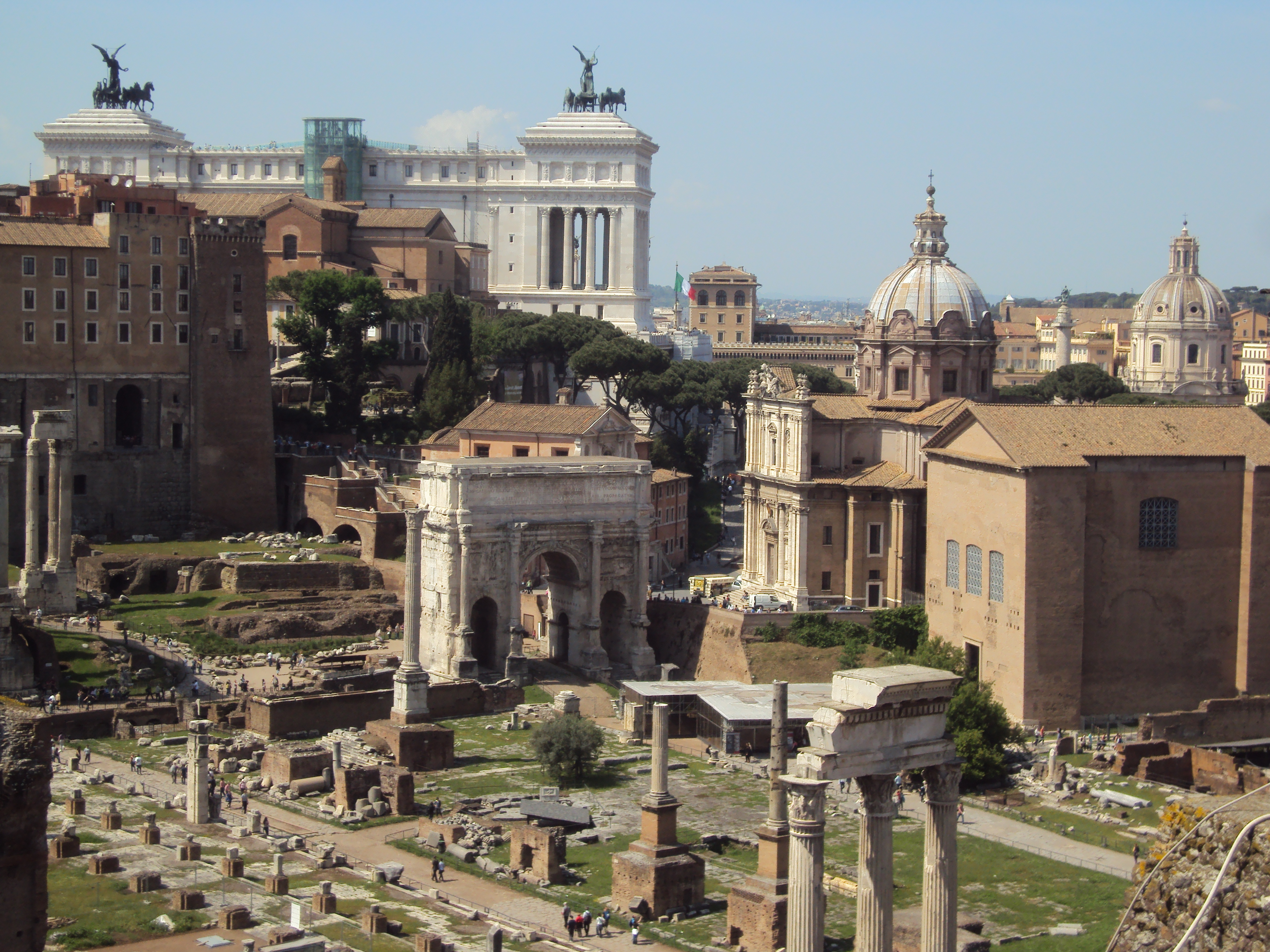 Forum Romanum